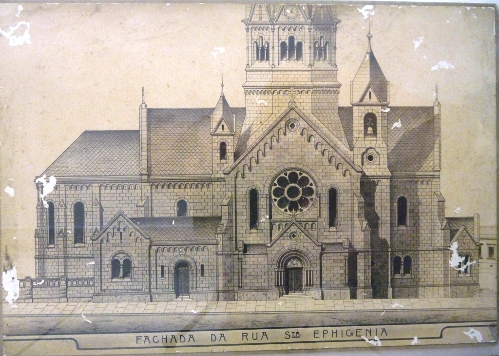 Projeto arquitetônico da fachada da Igreja de Santa Efigênia - vista frontal